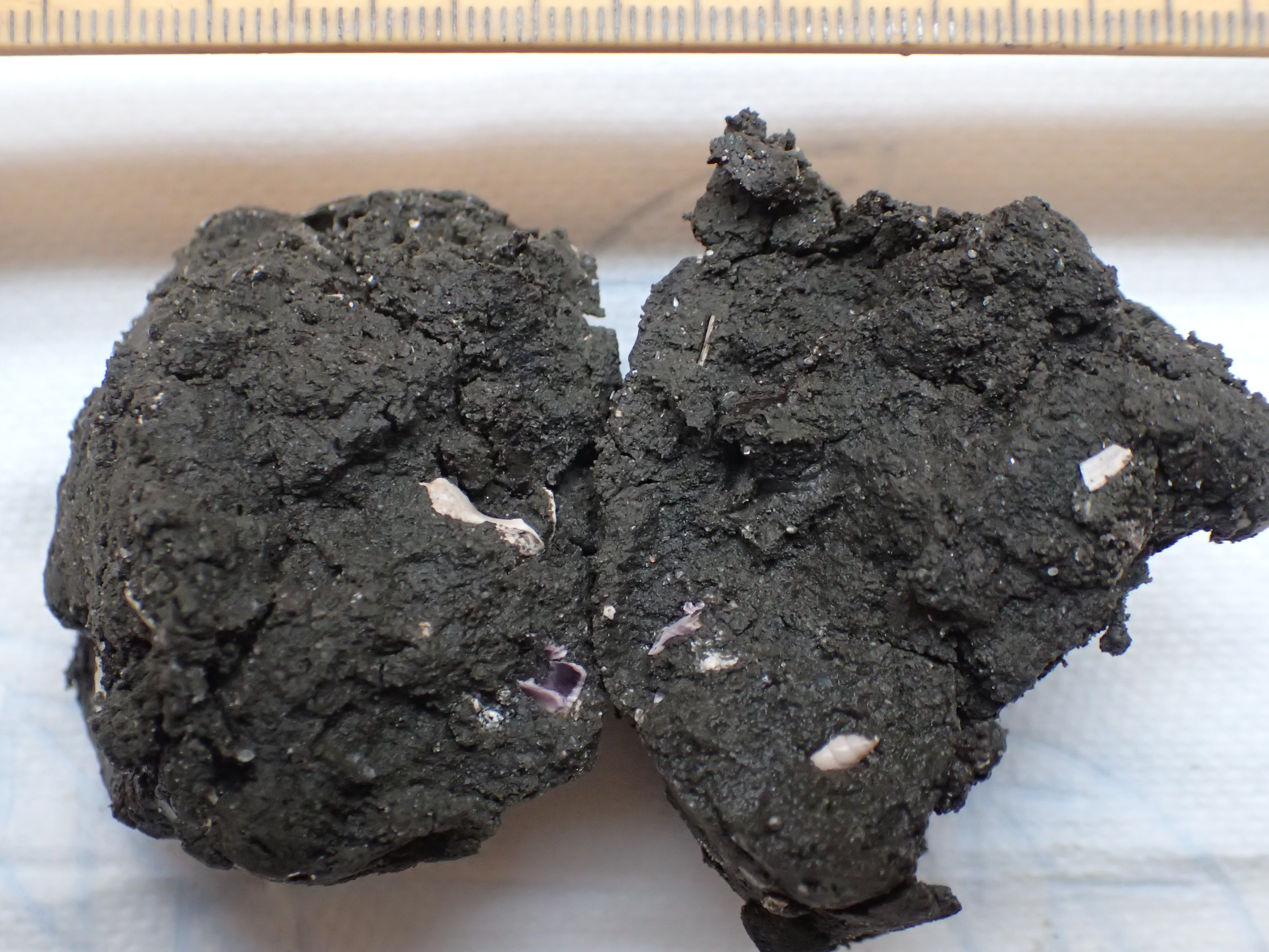 Skalholdig gytje fra det marine forland ved Tengslemark i Odsherred, Danmark (skala øverst i mm).